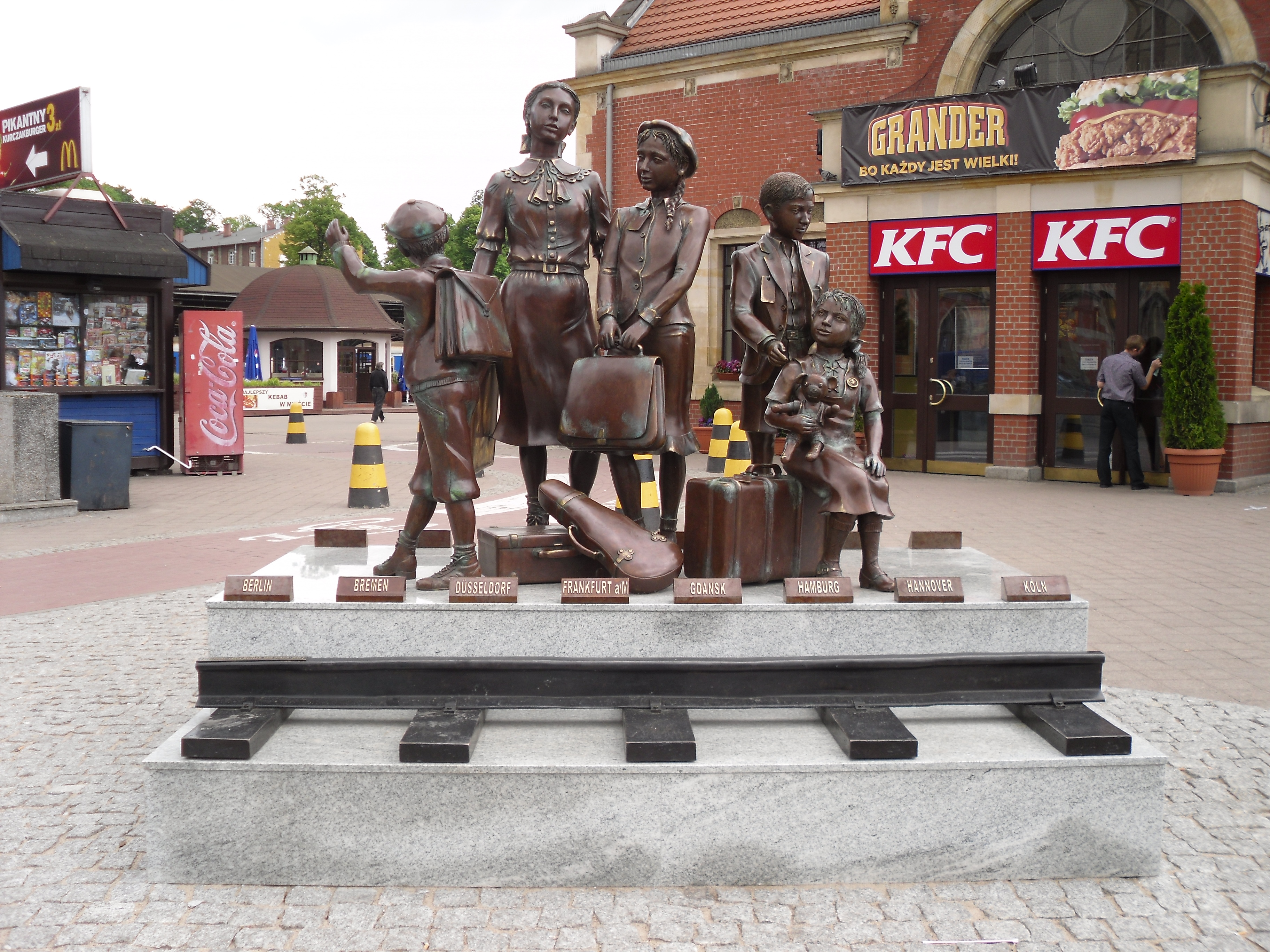 Pomnik Kindertransport przed Gdańskiem Głównym.